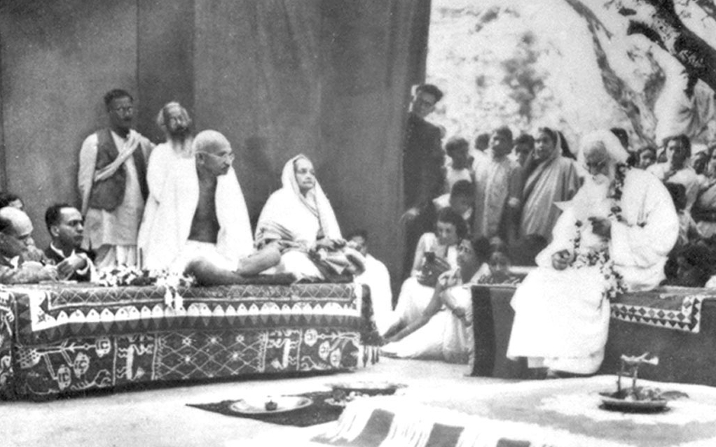 Gandhi and Kasturba at Shantiniketan visiting Rabindranath Tagore.